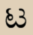 ттакараву